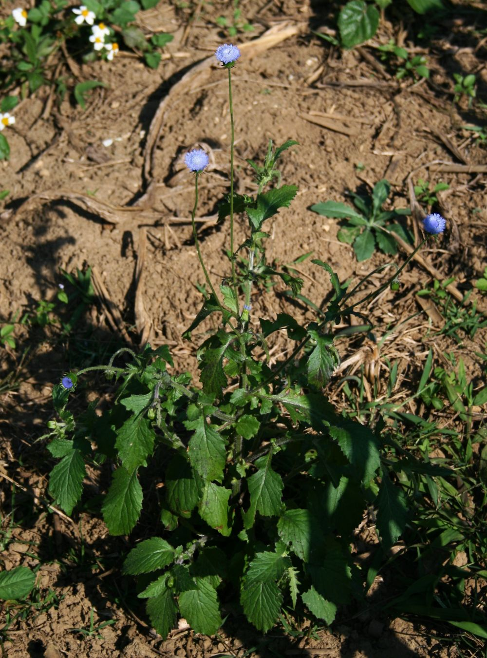 Crassocephalum rubens, Korbblütler (Asteraceae) - Vietnam/Việt Nam: Pa So, Phong Thổ (Prov. Lai Châu)